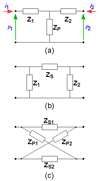 Cuadripolos